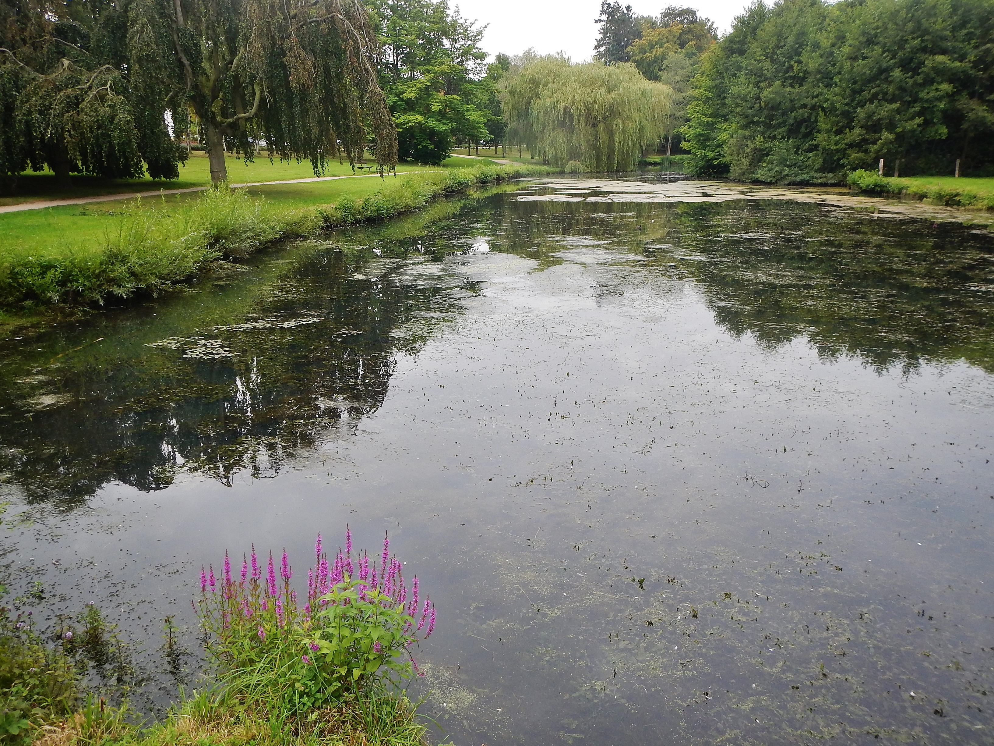 Kurpark im Ostseebad Timmendorfer Strand